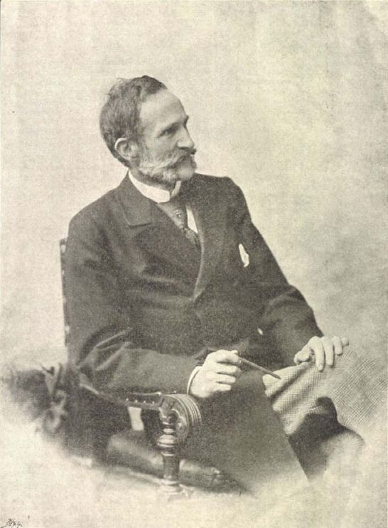 Beöthy Zsolt irodalomtörténész 1900-ban